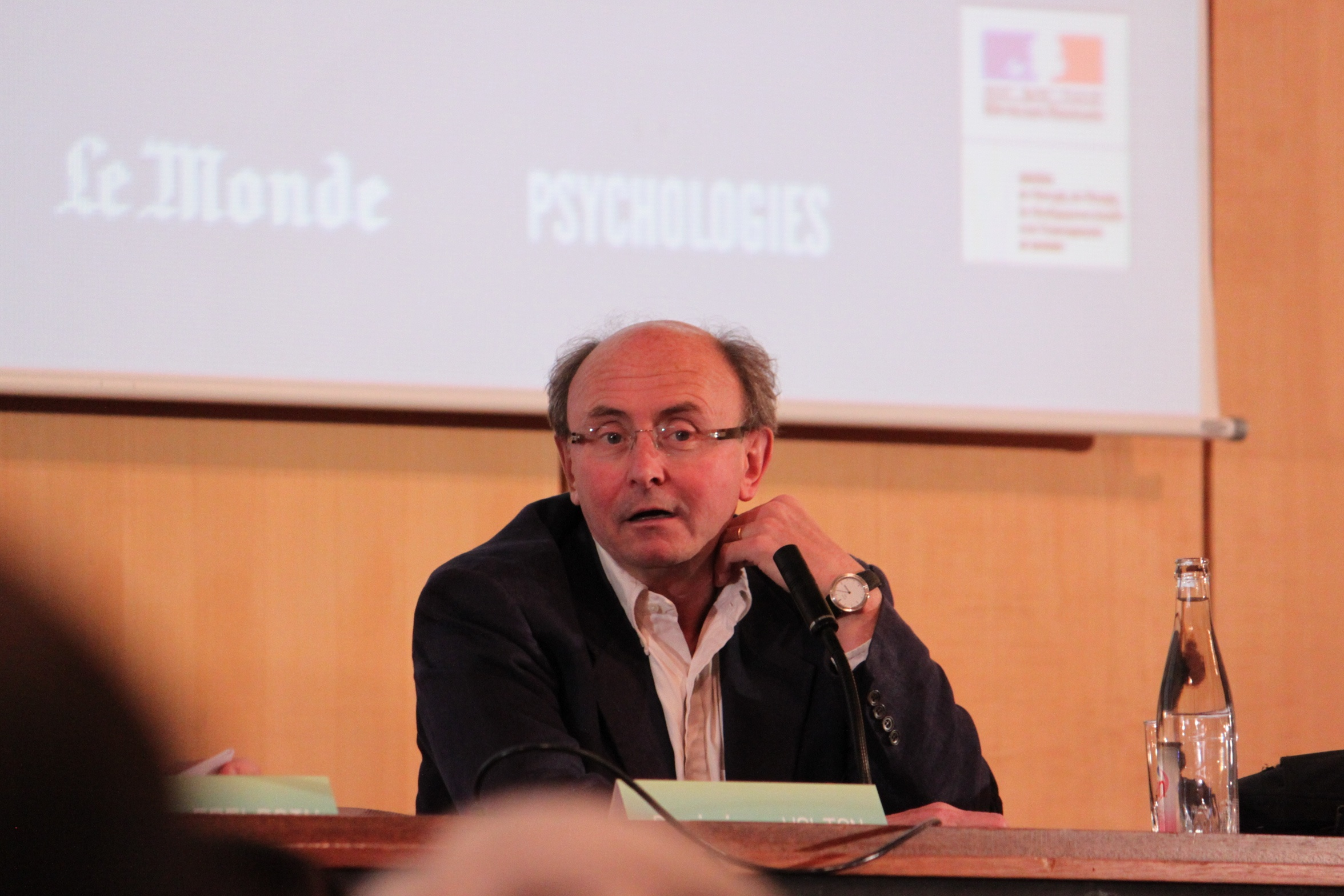 Dominique Wolton à l'Université de la Terre, à Paris, le 2 avril 2011.